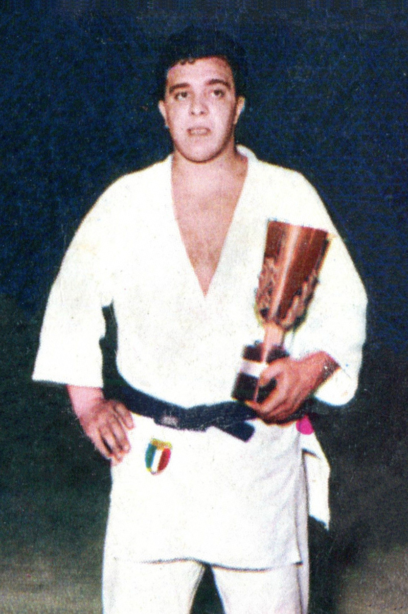 CAMPIONI DELLO SPORT 1966/67 - Figurina/Sticker n. 62 - N. TEMPESTA